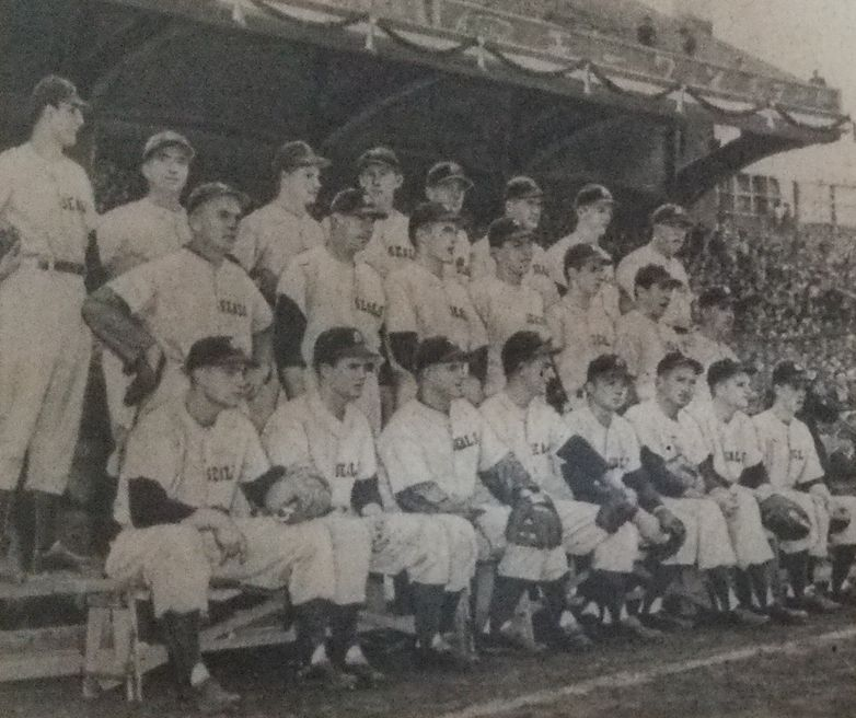 1949年の訪日時のサンフランシスコ・シールズ